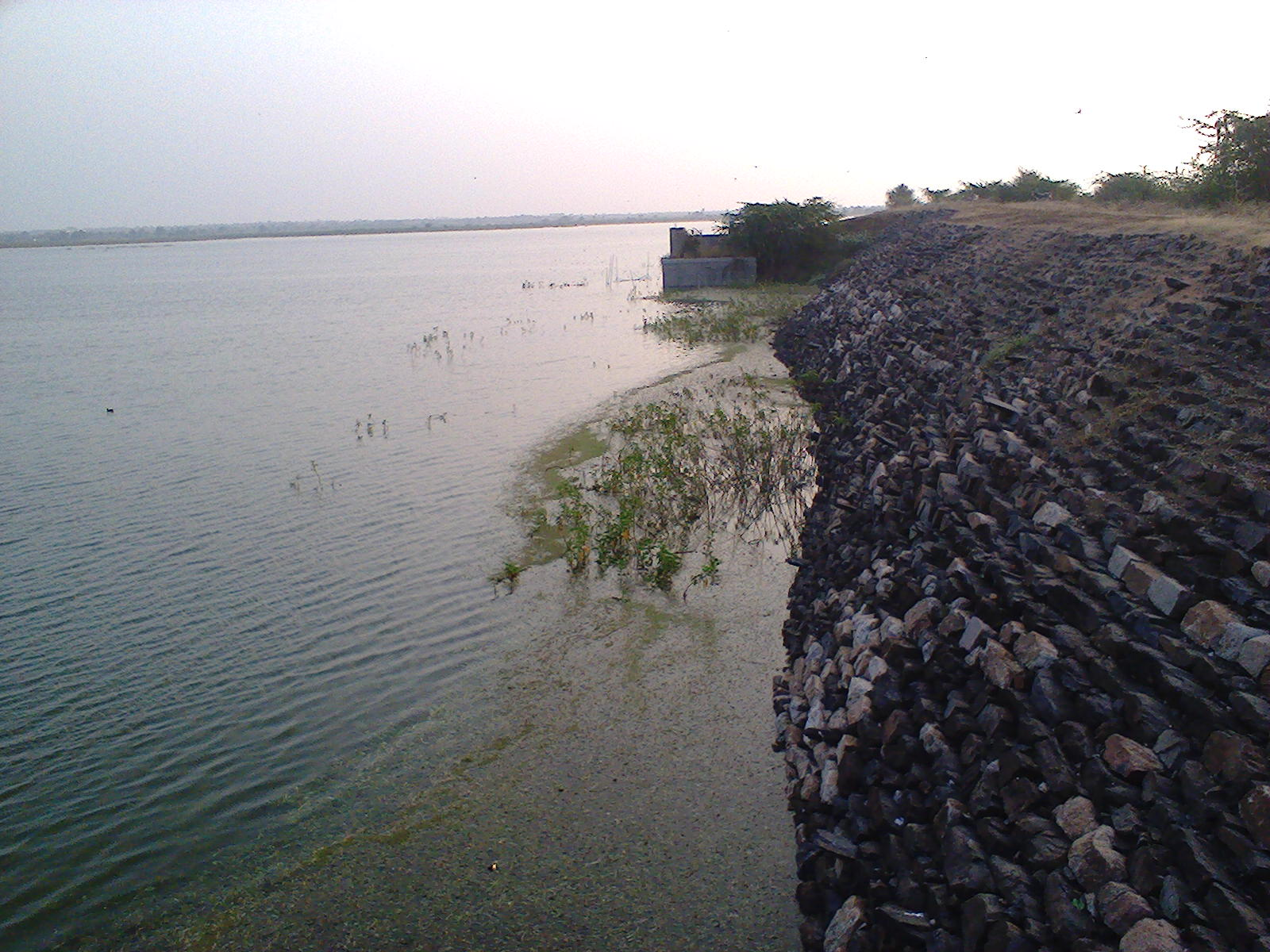 సంగాల చెరువు